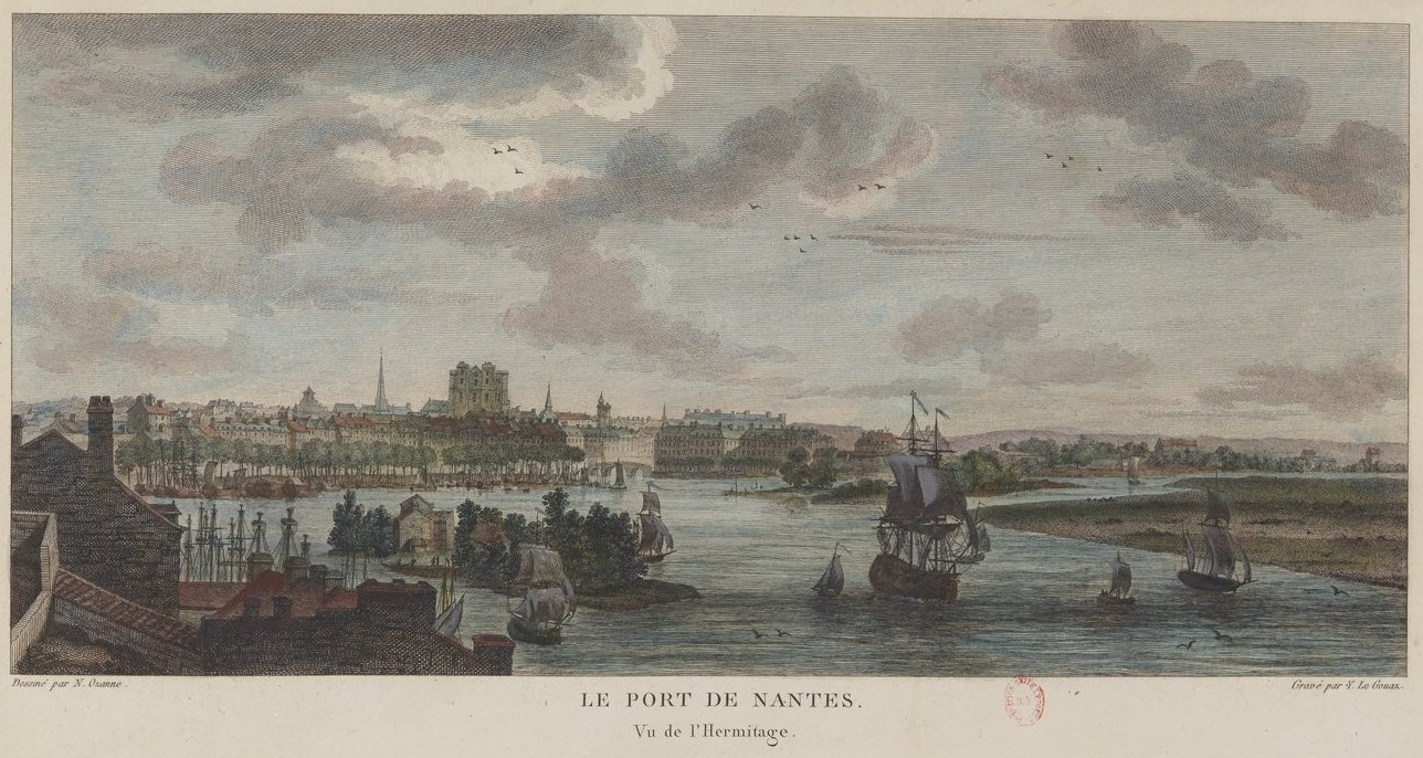 Planche tirée des Nouvelles vues perspectives des ports de France dessinées pour le Roi par M. Ozanne. Gravées par Y. Le Gouaz en 1776.